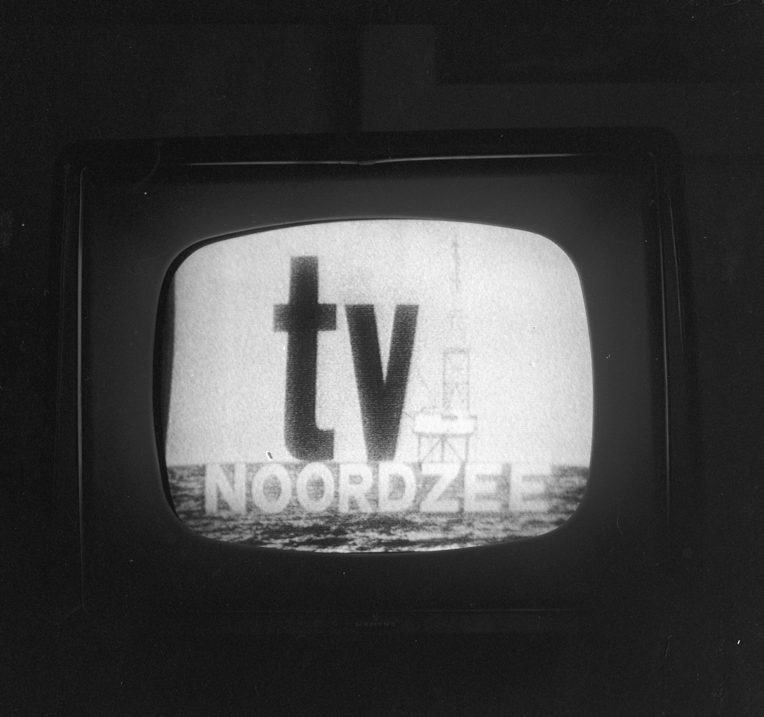 Collectie / Archief : Fotocollectie Anefo Reportage / Serie : [ onbekend ] Beschrijving : Testbeeld TV Noordzee met afbeeldin van tv-mast Datum : 14 augustus 1964 Trefwoorden : televisie, testbeelden Instellingsnaam : REM-eiland Fotograaf : Gelderen, Hugo van / Anefo Auteursrechthebbende : Nationaal Archief Materiaalsoort : Negatief (zwart/wit) Nummer archiefinventaris : bekijk toegang 2.24.01.03 Bestanddeelnummer : 916-7662